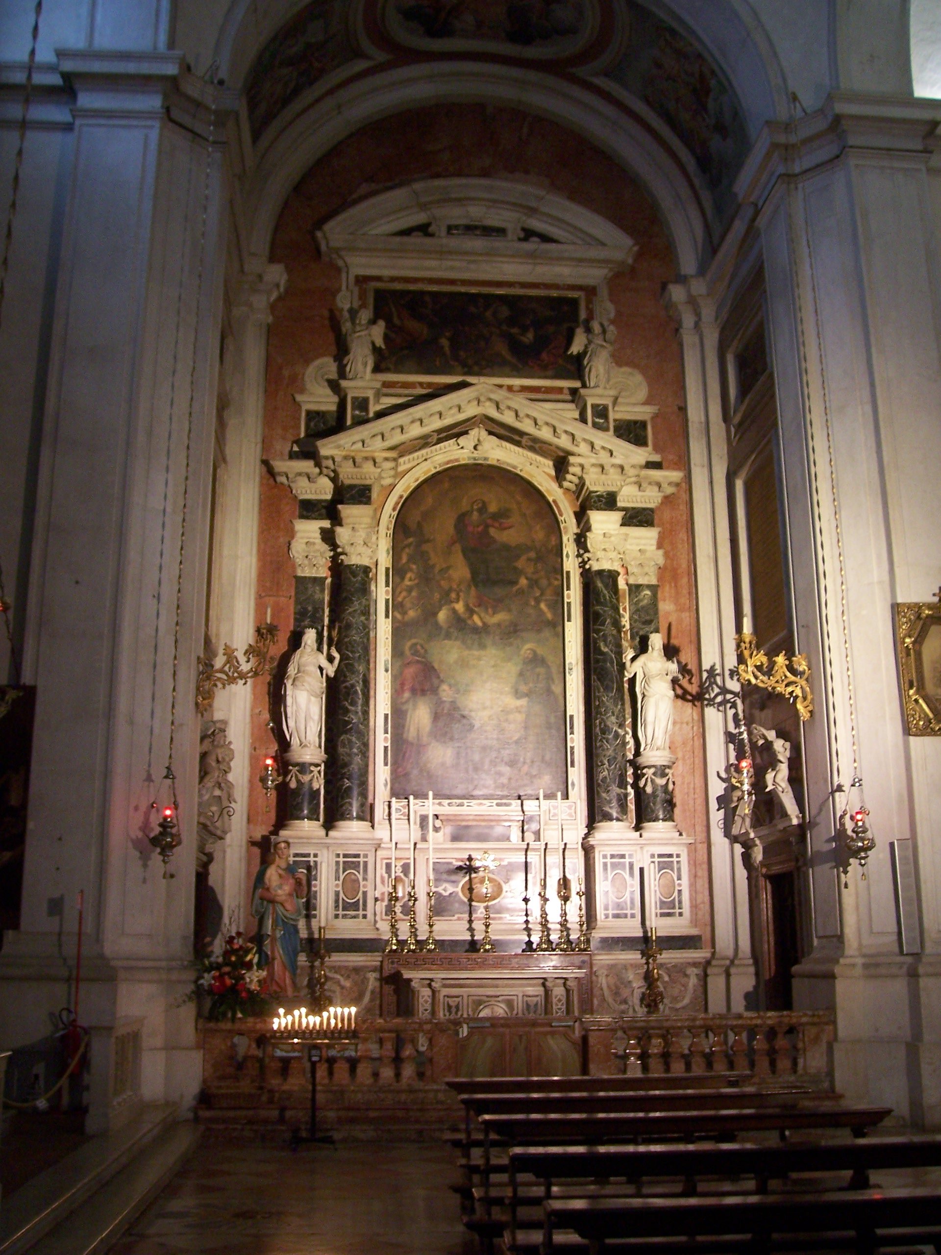 altare laterale duomo nuovo brescia3.jpg